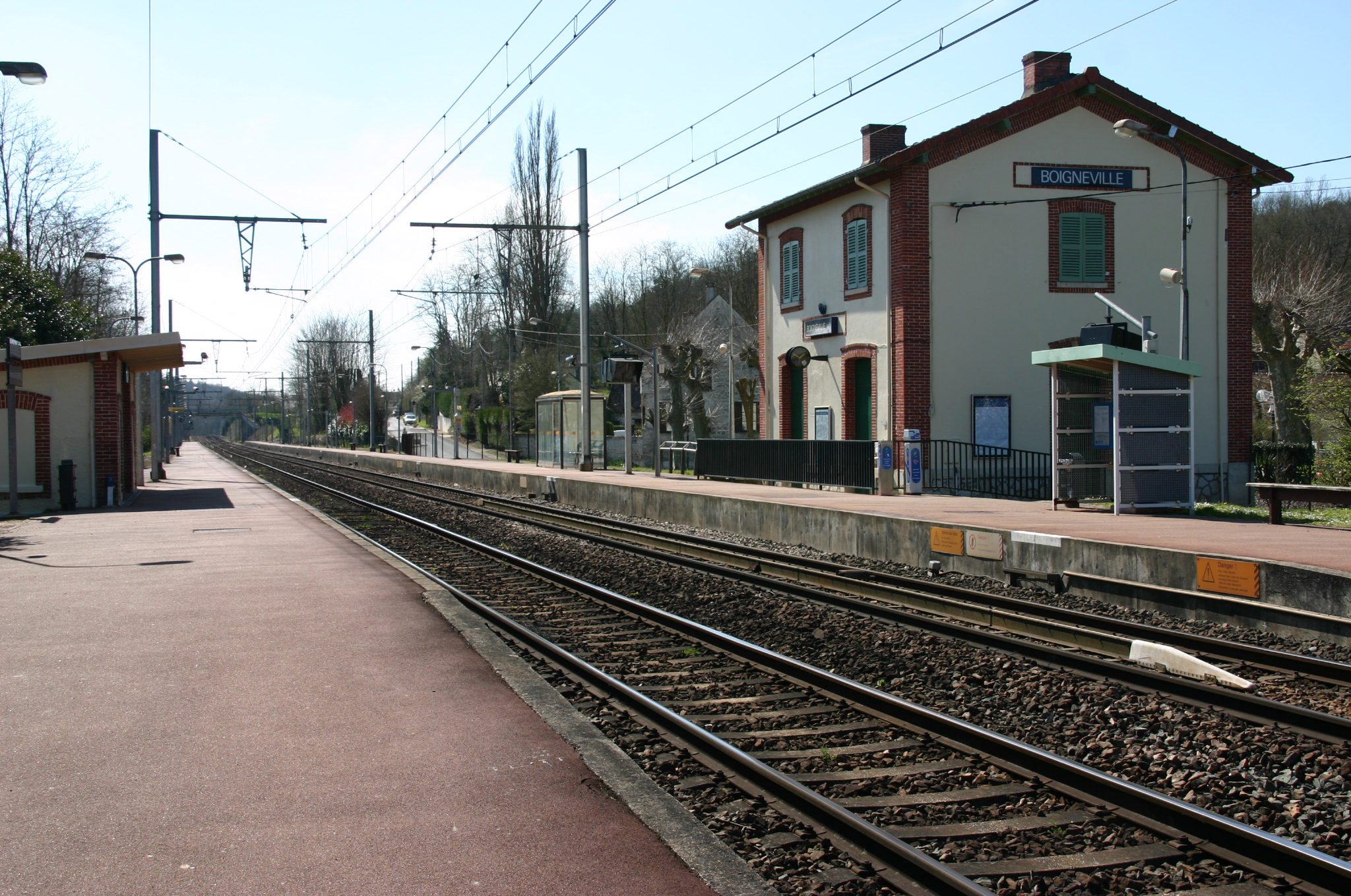 Gare de Boigneville, Essonne (France)